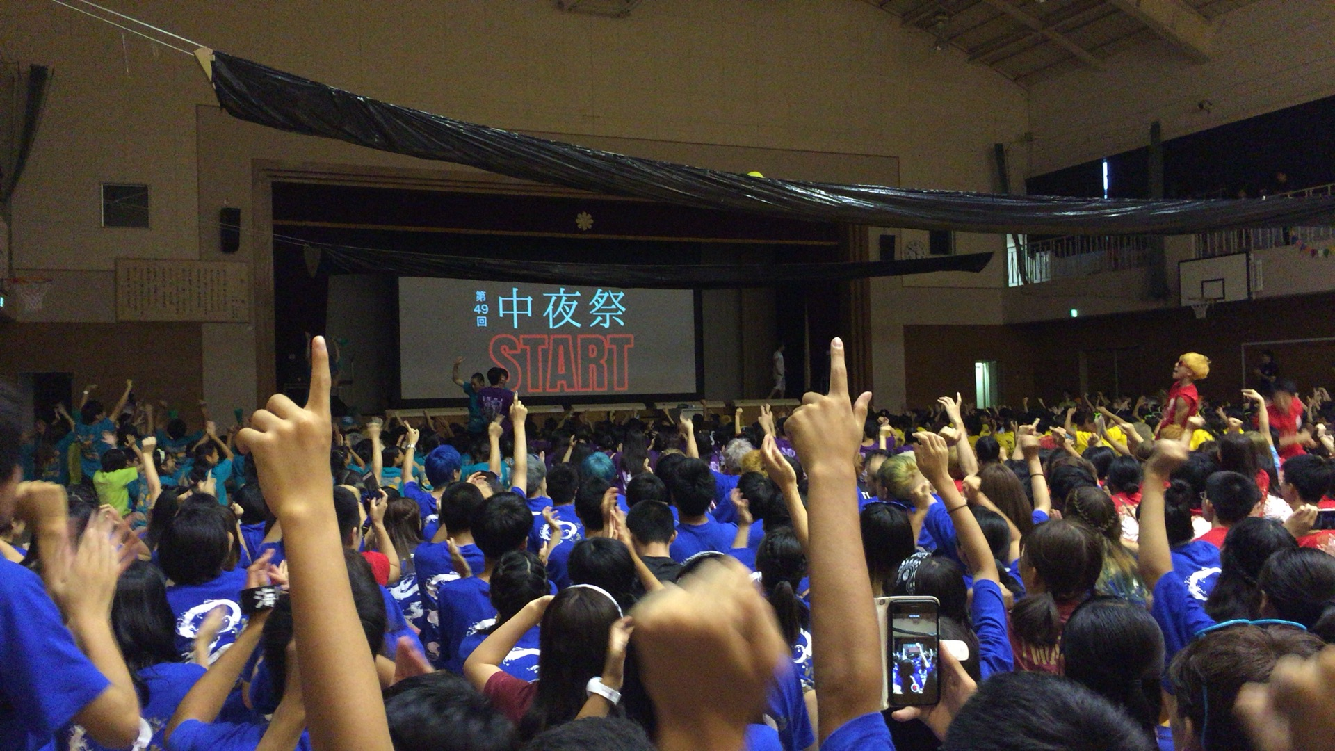 国分寺高校の写真です